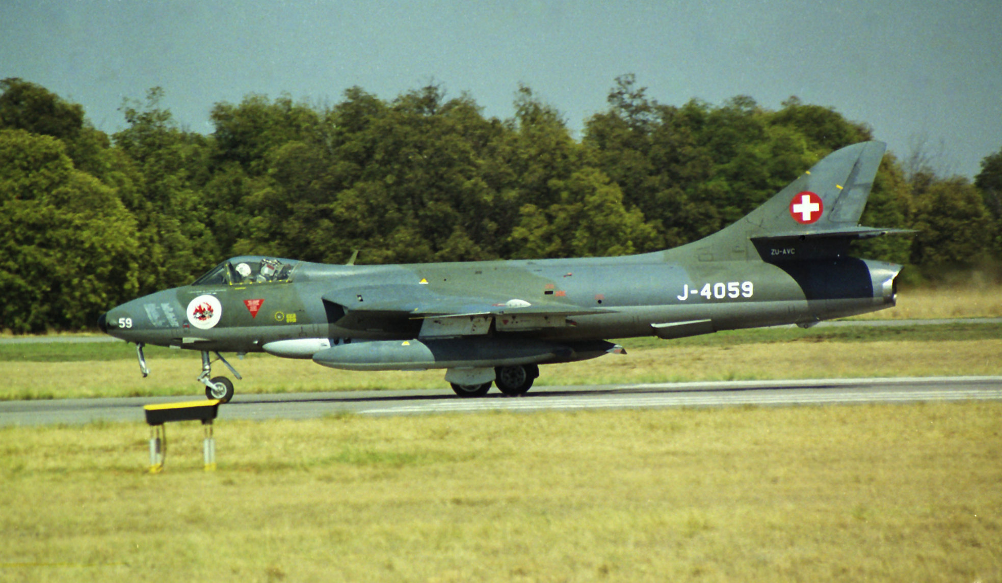 Hawker Hunter F.58 ZU-AVC